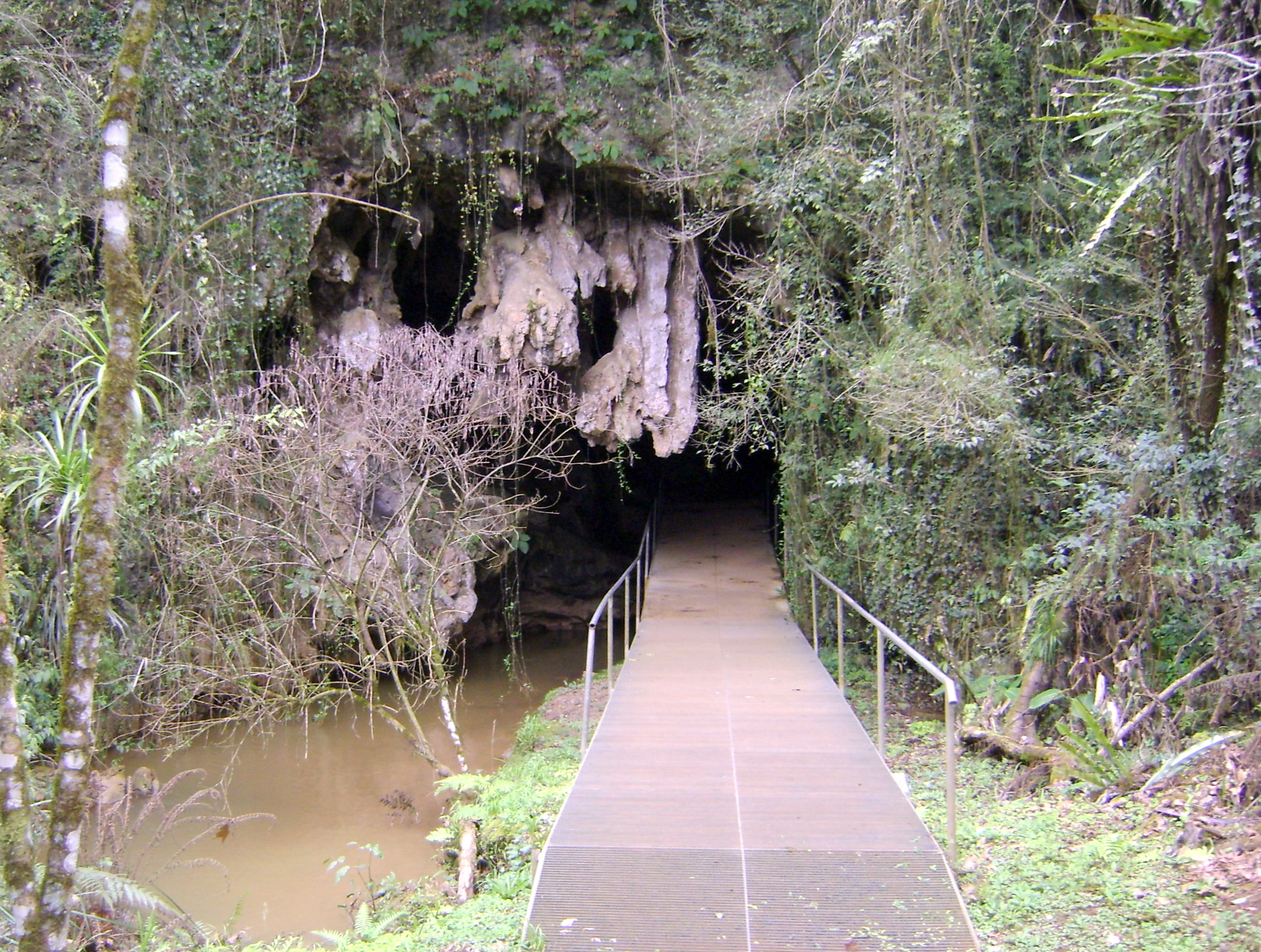 Entrada da Gruta do Bacaetava, em Colombo (Grande Curitiba), PR, Sul do Brasil.